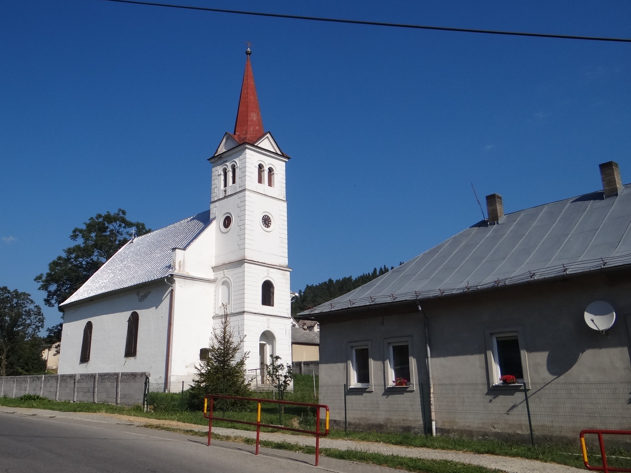 Výborná, kostol